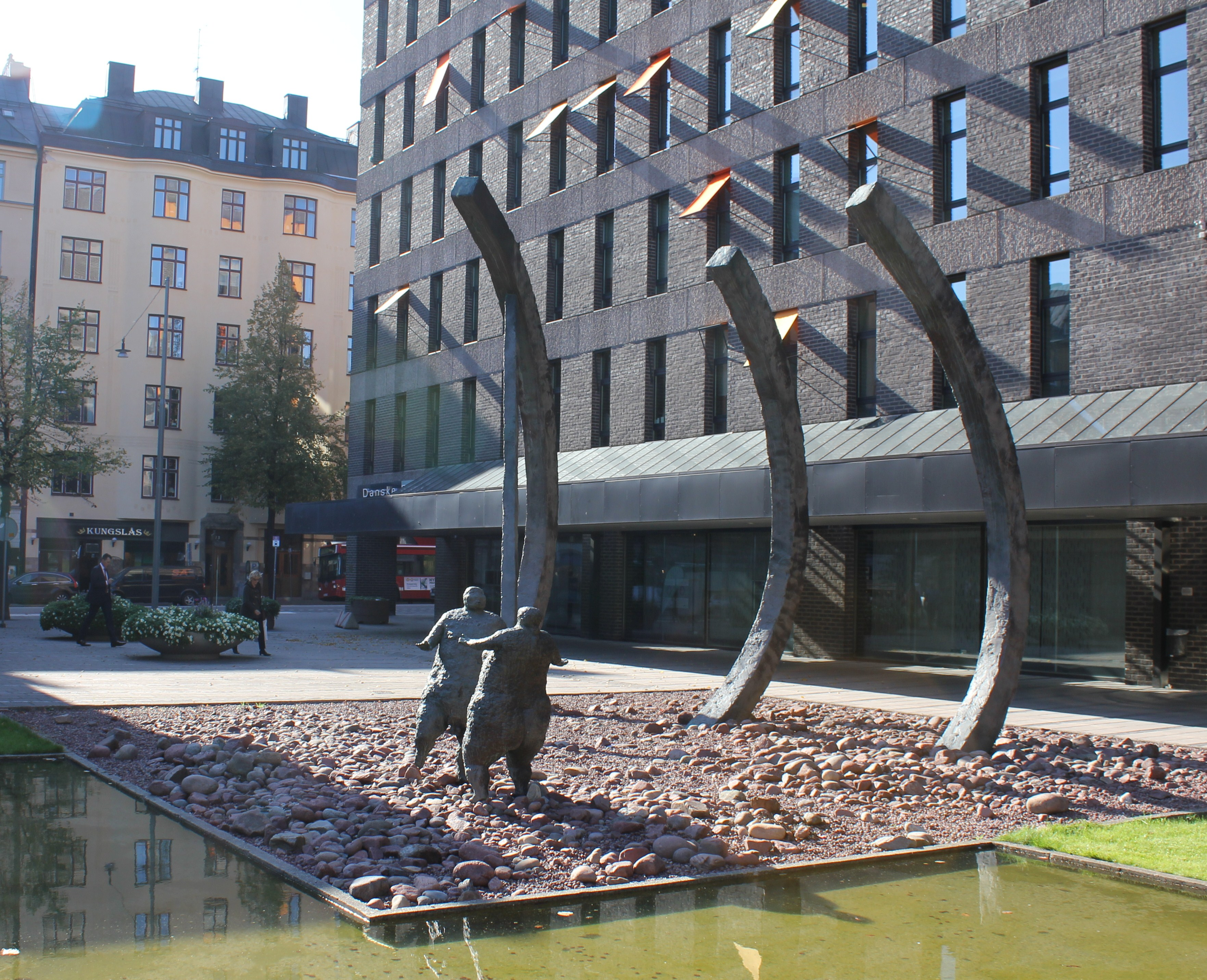 Noas dans skulpterad av Lasse Trollberg 1975. Rest utanför Trygg-Hansa-huset, Fleminggatan, Kungsholmen, Stockholm.